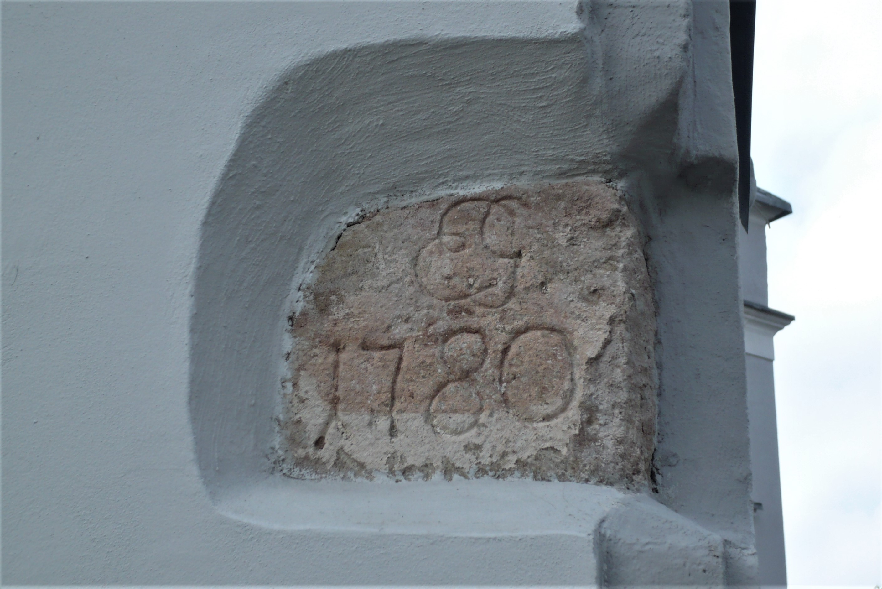 Kamieniec.Kamień